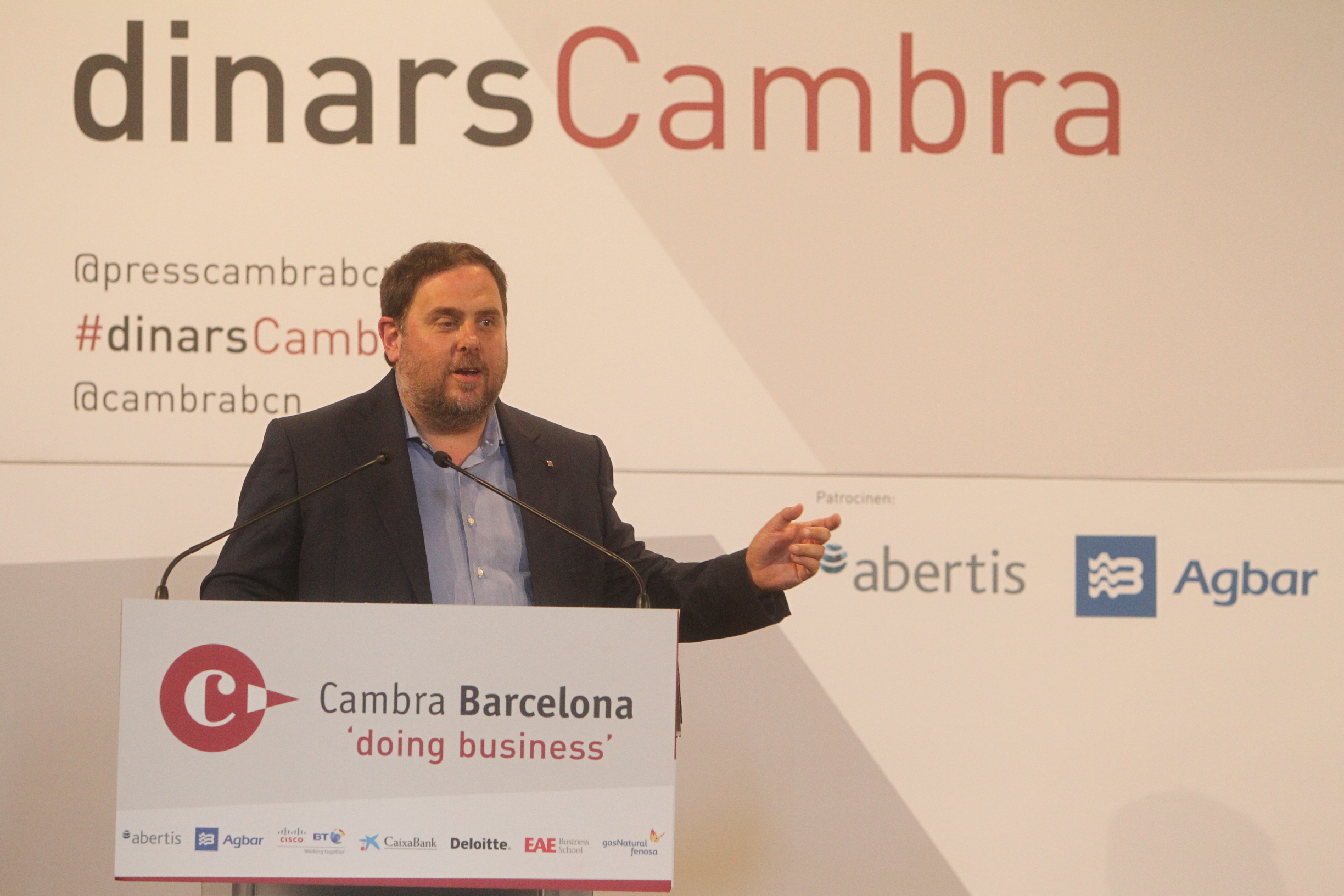 Dinar Cambra amb Oriol Junqueras